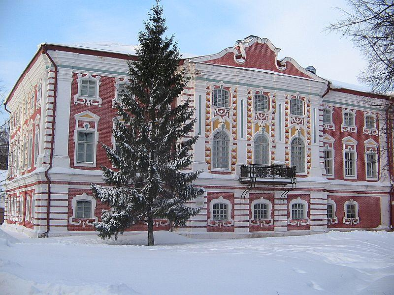 Иосифовский корпус (палаты Иосифа Золотого). Архиерейский двор. Вологда